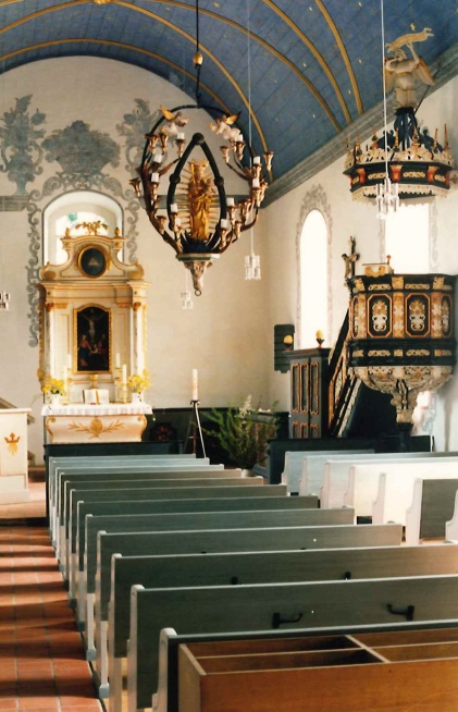 Übersichtsaufnahme mit Altar, Kanzel und Marienleuchter